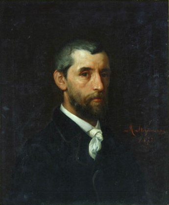 Mihail Ştefănescu (1845-1900) - Portretul d-lui Demetriad / Portret de bărbat, ulei pe pânză, 63.5x52.5cm, semnat la mijloc dreapta cu roșu: M. Ștefănescu, 1872, provenind de la Muzeul Toma Stelian, numărul 1019 1n inventarul Galeriei Naționale - Muzeul Naţional de Artă al României, Bucureşti